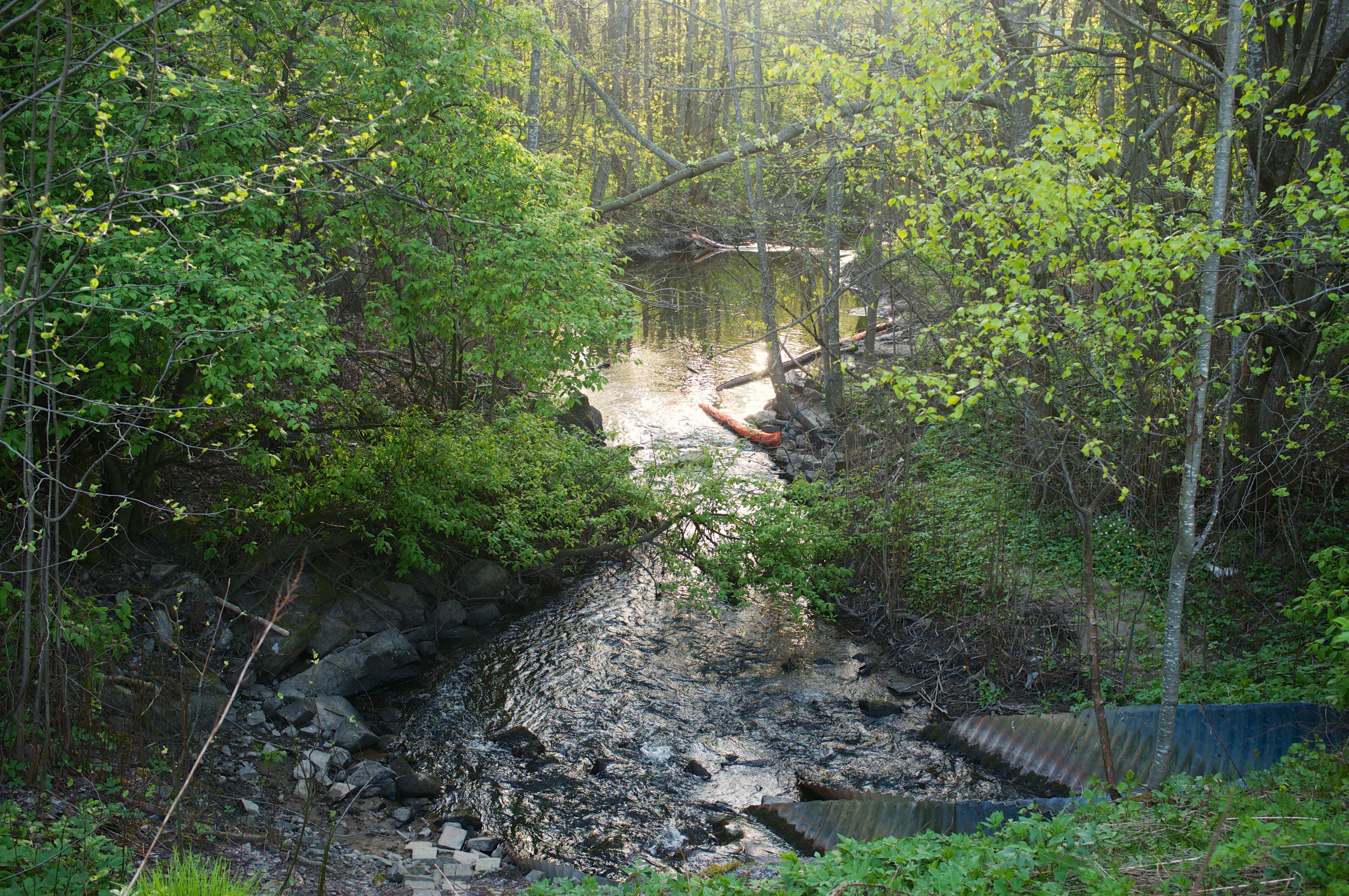 Ljanselva på Ljabru i Oslo.